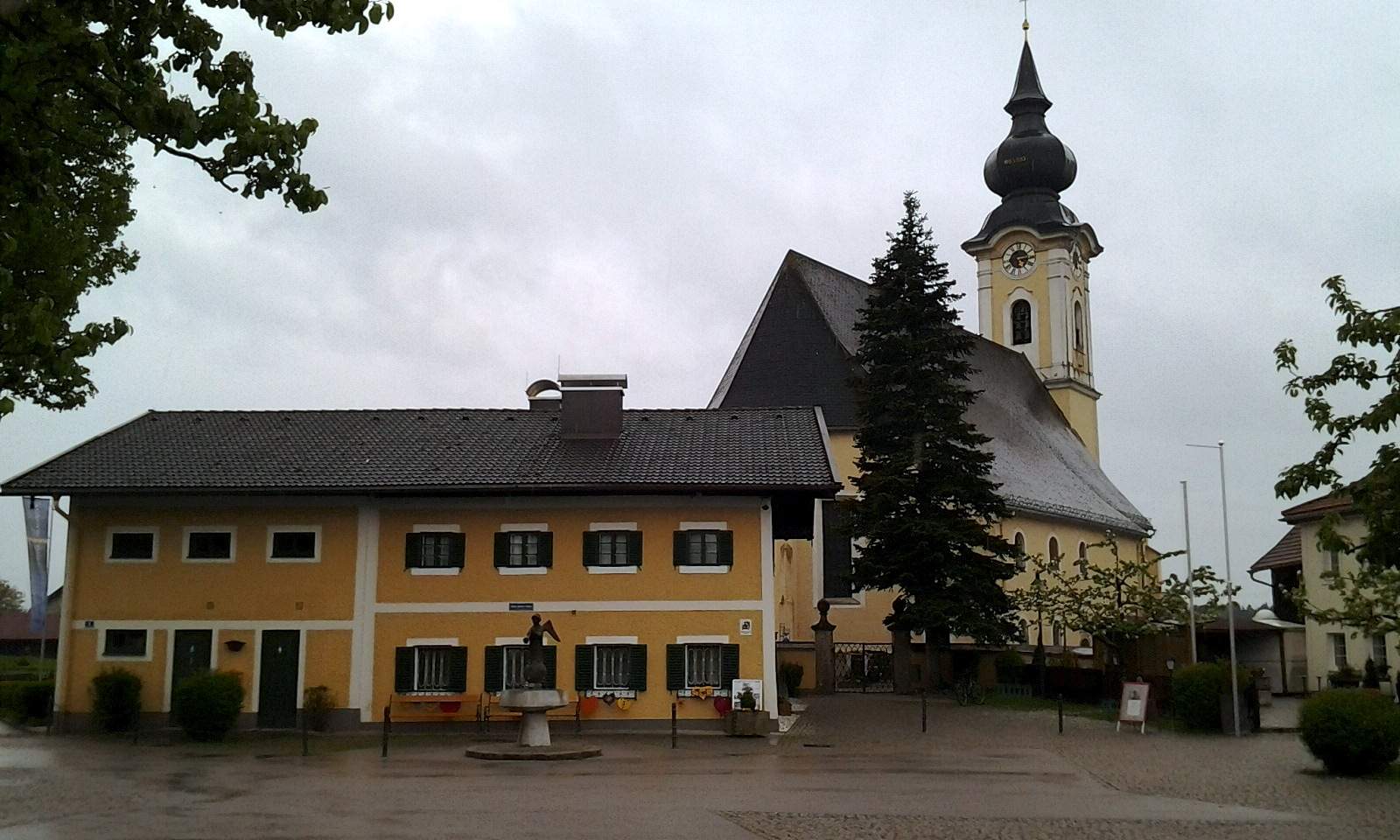 Stille-Nacht-Platz in Arnsdorf, Gemeinde Lamprechtshausen, Land Salzburg. Das Gebäude im Vordergrund ist die älteste noch im Betrieb befindliche Volksschule Österreichs. Im Obergeschoß wohnte Franz Xavrer Gruber, der Komponist des Weihnachtsliedes "Stille Nacht, heilige Nacht", wo er es vermutlich auch komponierte. Im Hintergrund die Wallfahrtskirche Maria im Mösl.